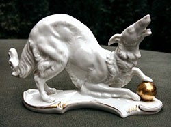 Statuette art déco Fraureuth